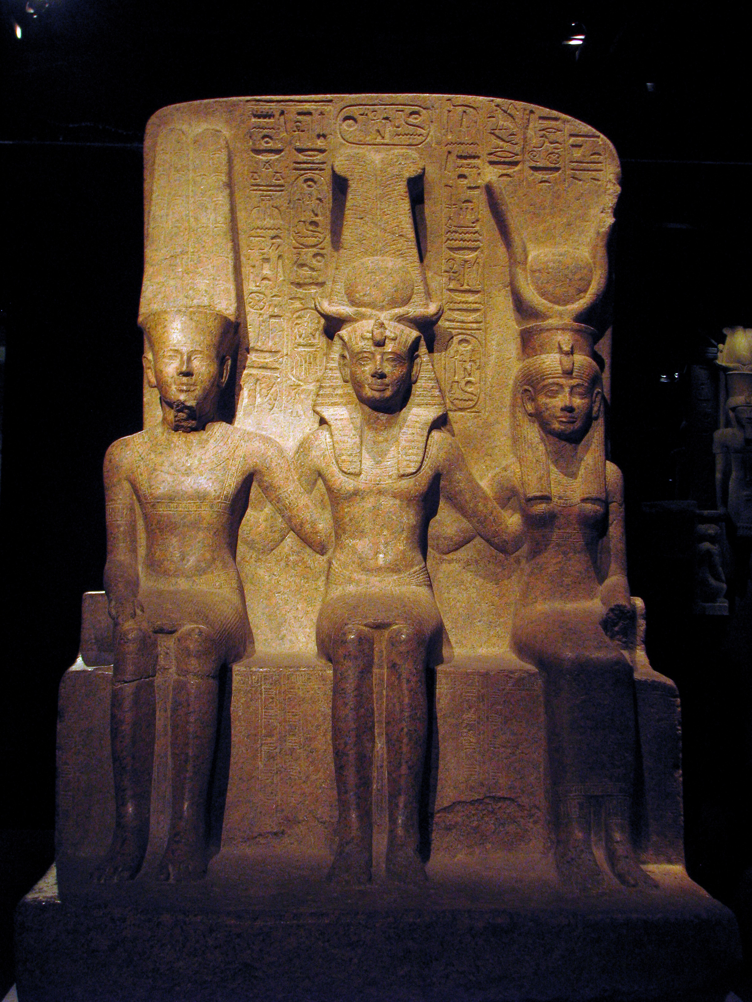 E' raffigurato il faraone Ramesse II seduto con il dio Amon e la moglie Mut. Materiale: granito rosa, XIX dinastia, regno di Ramesse II (1279-1213 A.C.), Tempio di Amon, Tebe, Egitto. Conservato al Museo Egizio di Torino.